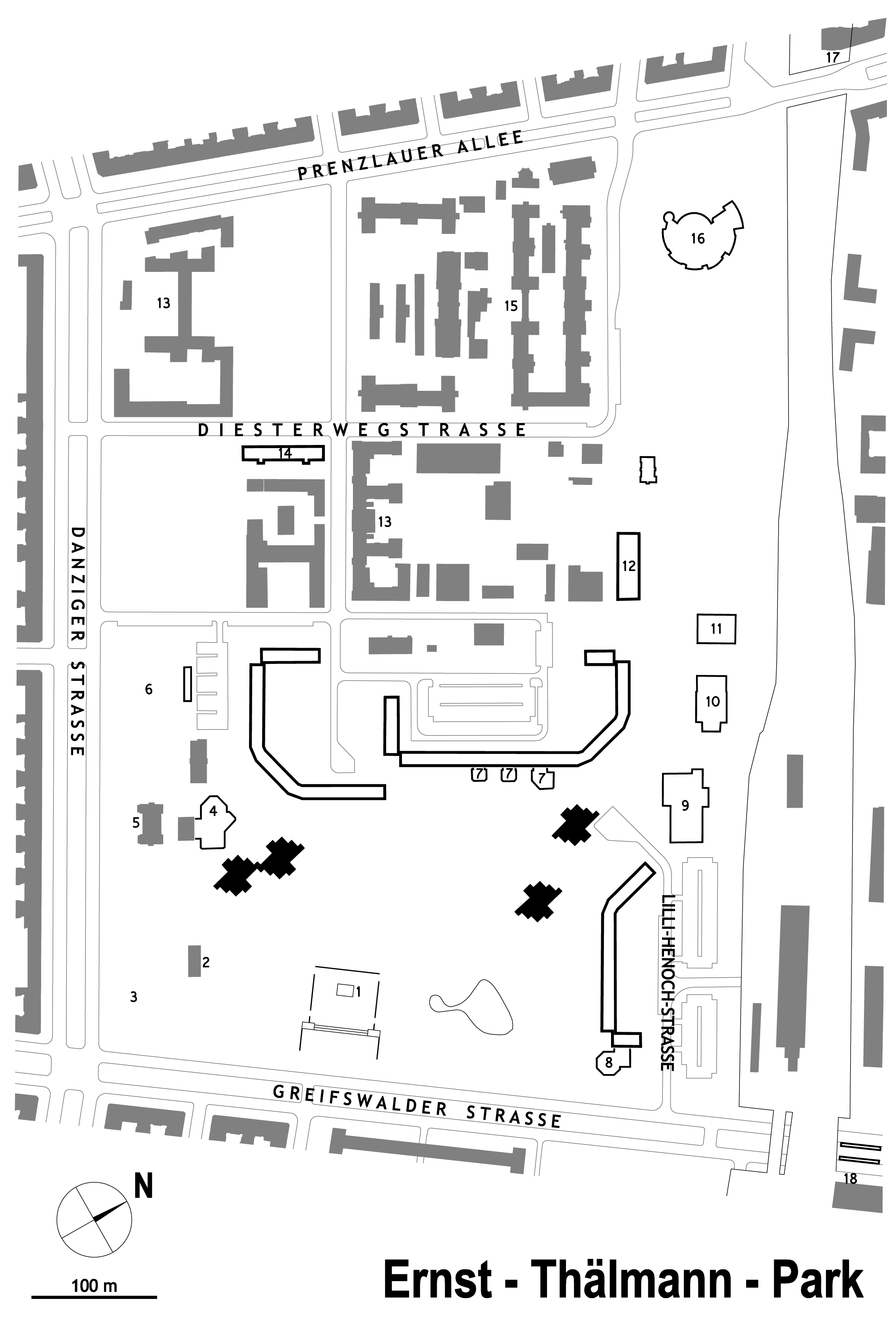 Plan Ernst-Thälmann-Park in Berlin